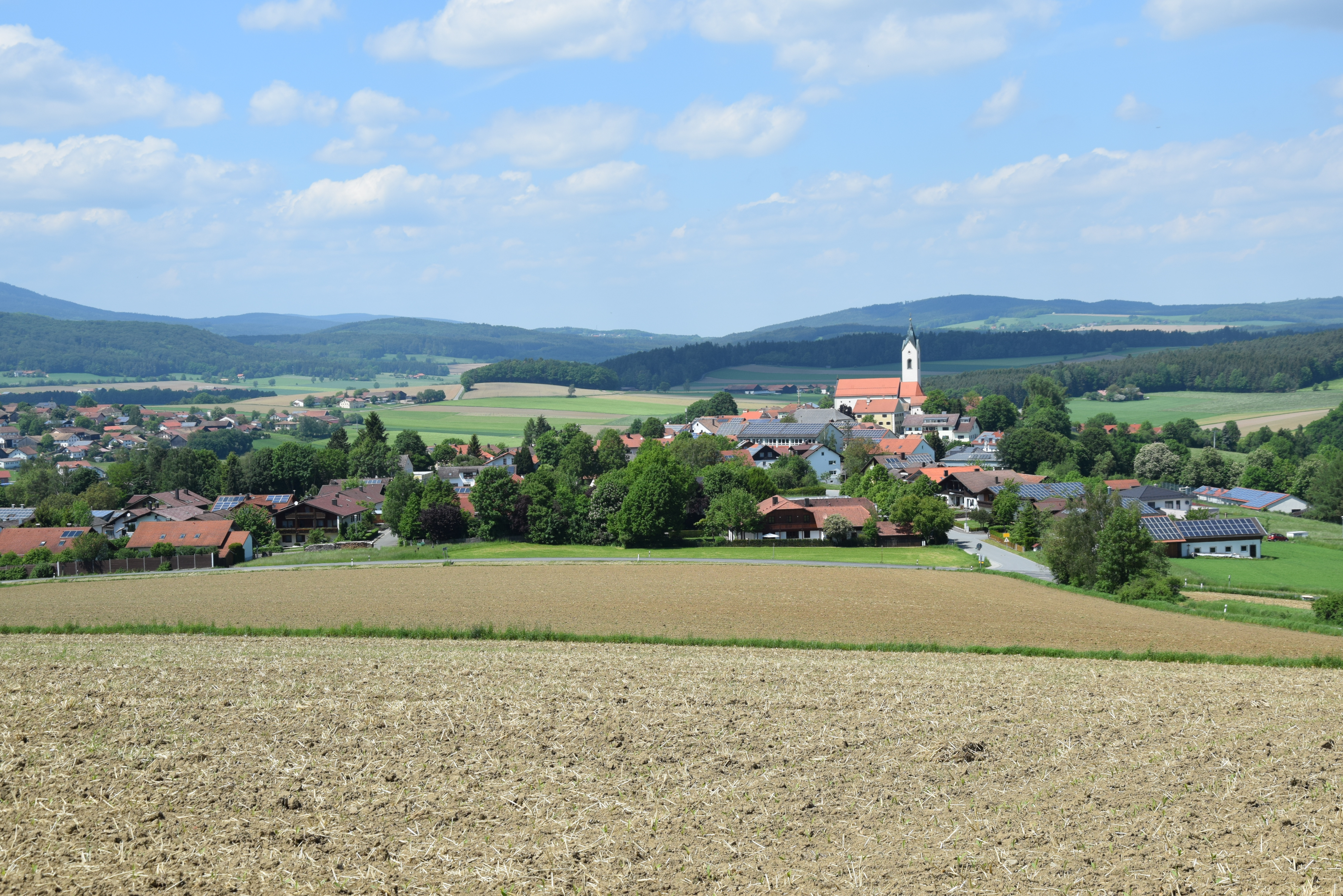 Eschlkam Aussichtsturm mit Blick auf den Stausee